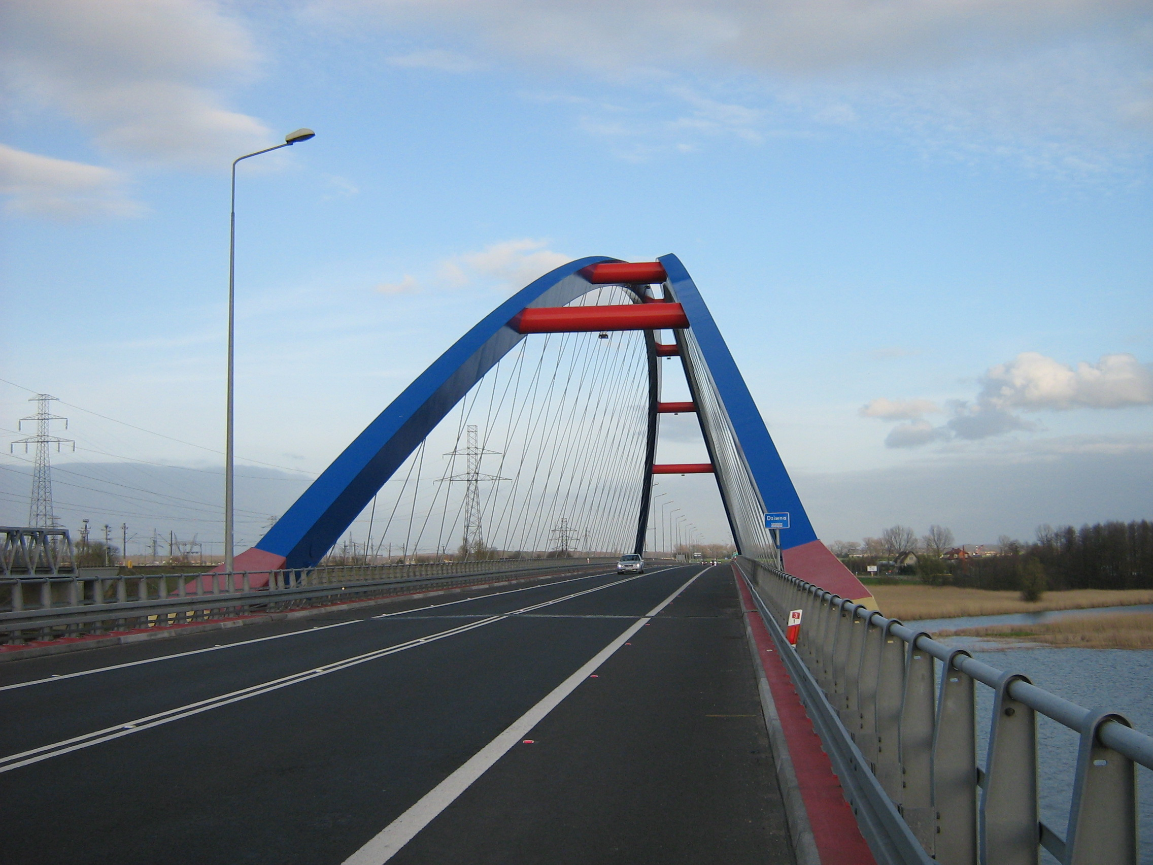 Most nad Dziwną w Wolinie, wciągu drogi krajowej nr 3